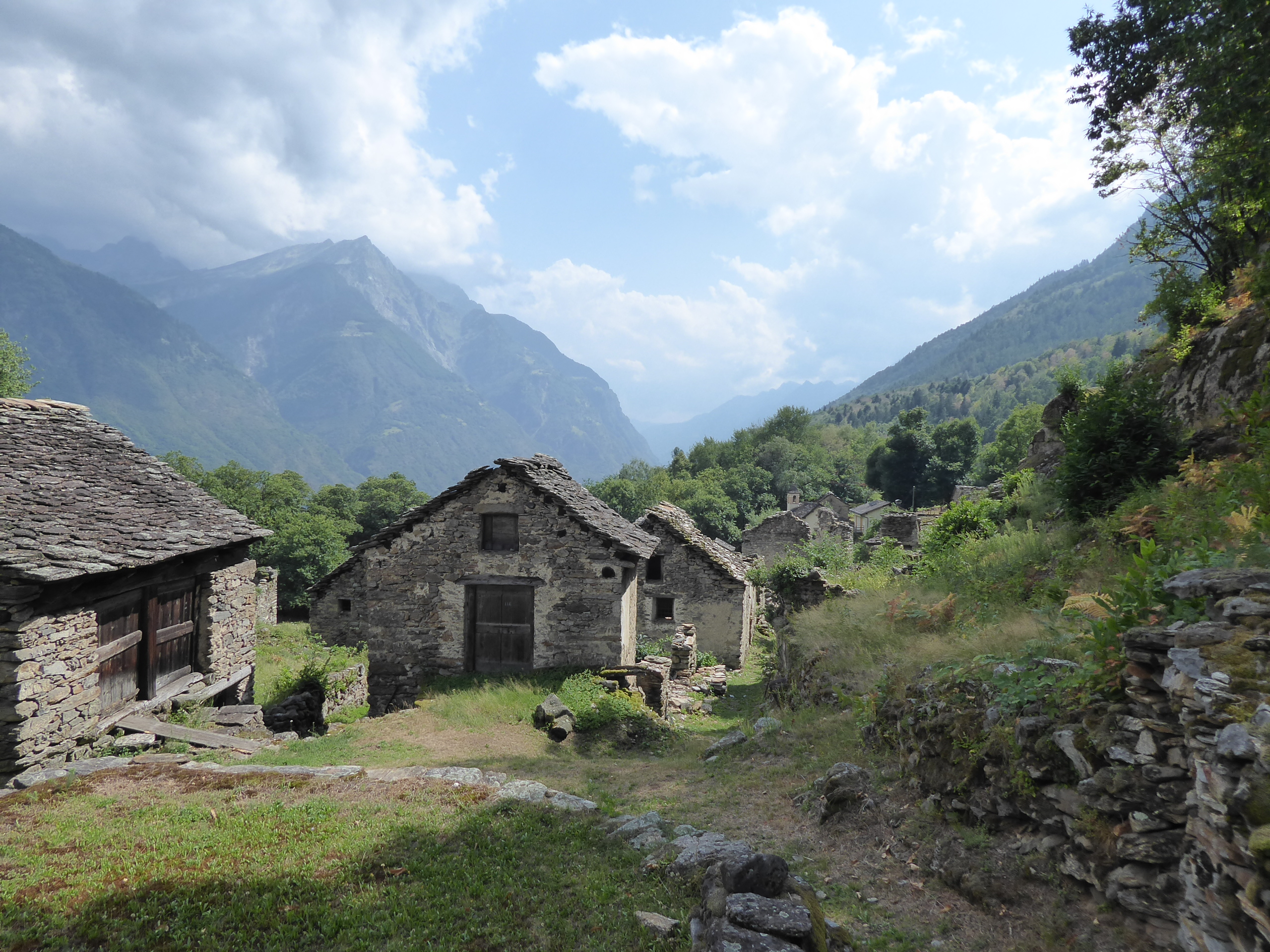 Selvapiana bei Ludiano: Der Ortskern von Selvapiana, oder Sülapièna 679 m, erreicht man in 30 Gehminuten von den Grotti di Ludiano.